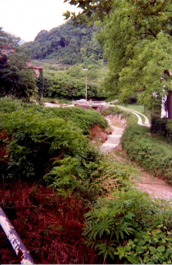 Rio Calcina ed i Vecchi Mulini, Colli Euganei (Torreglia / Padova / Italia)